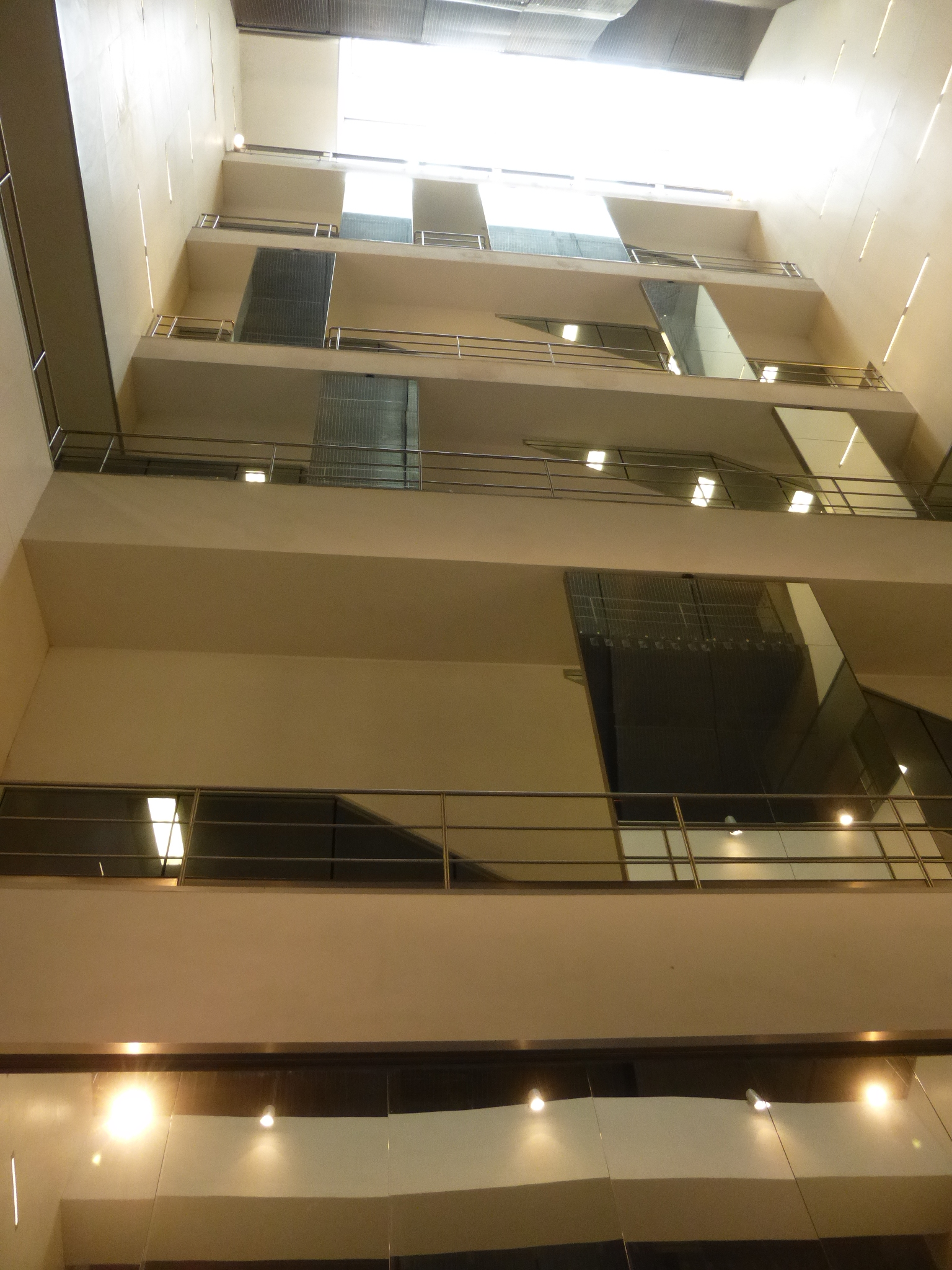 Roma, Metro B1 Libia, profondità